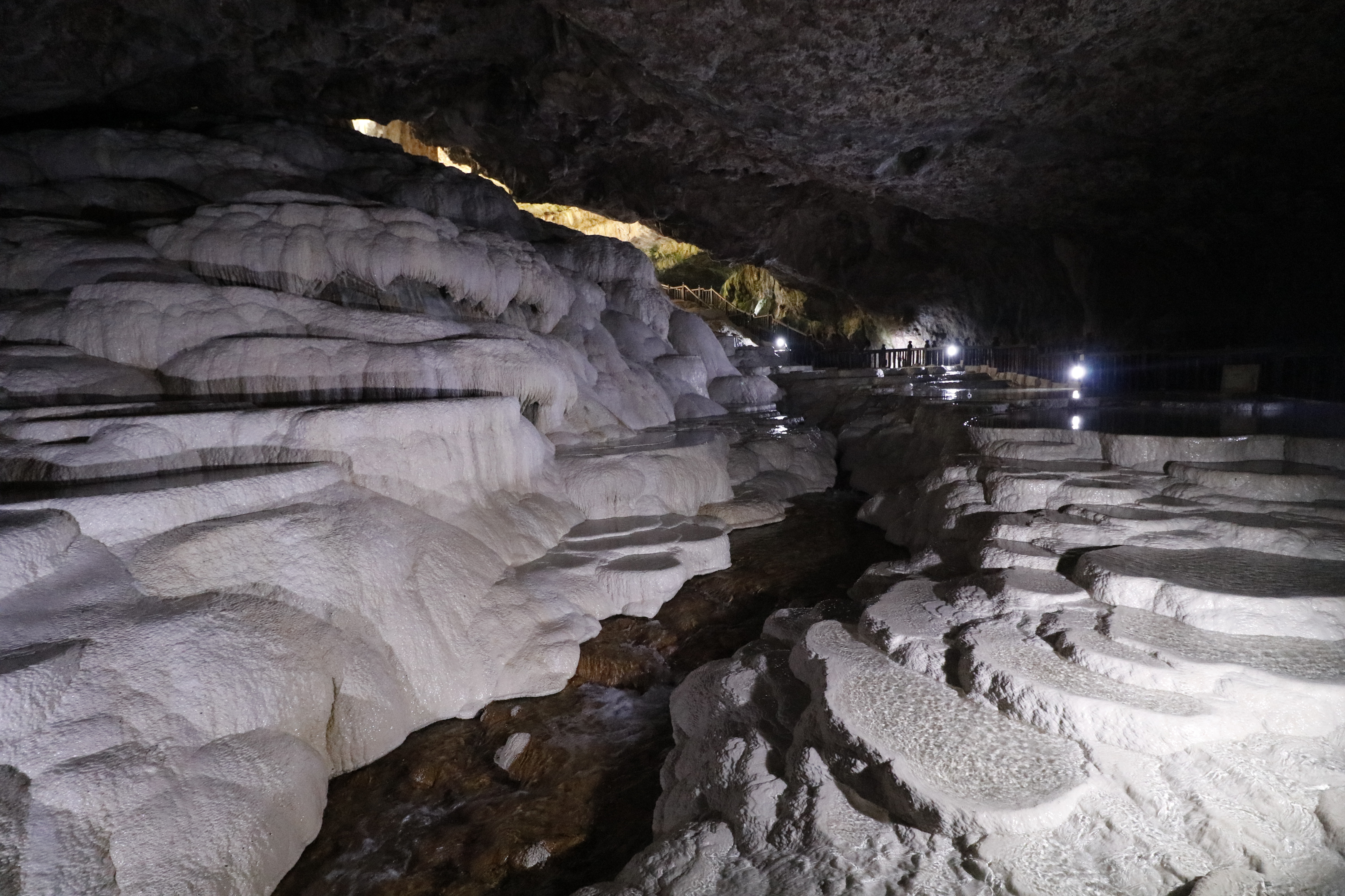 Denizli il merkezine 30 km. mesafede Honaz ilçesi Kaklık Mahallesindedir. Mağara içerisinde bol miktarda termal su bulunmaktadır. Berrak,renksiz ve kükürt kokulu olan bu su varlığı bazı cilt hastalıklarına iyi geldiği bilinmektedir.